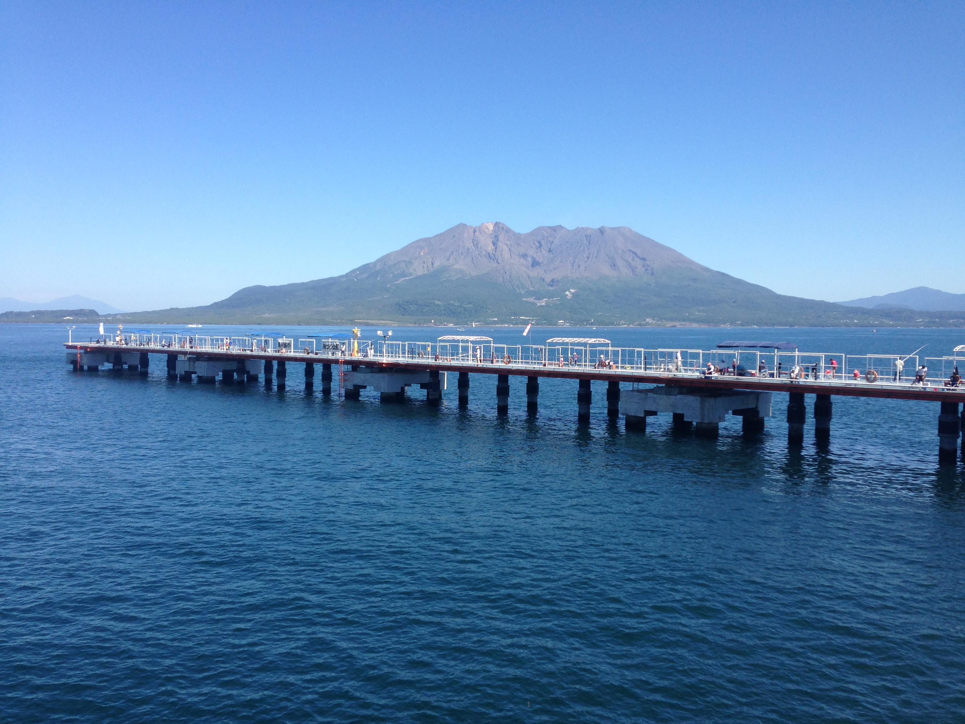 桜島を正面に向けてファミリーフィッシングを楽しめます。